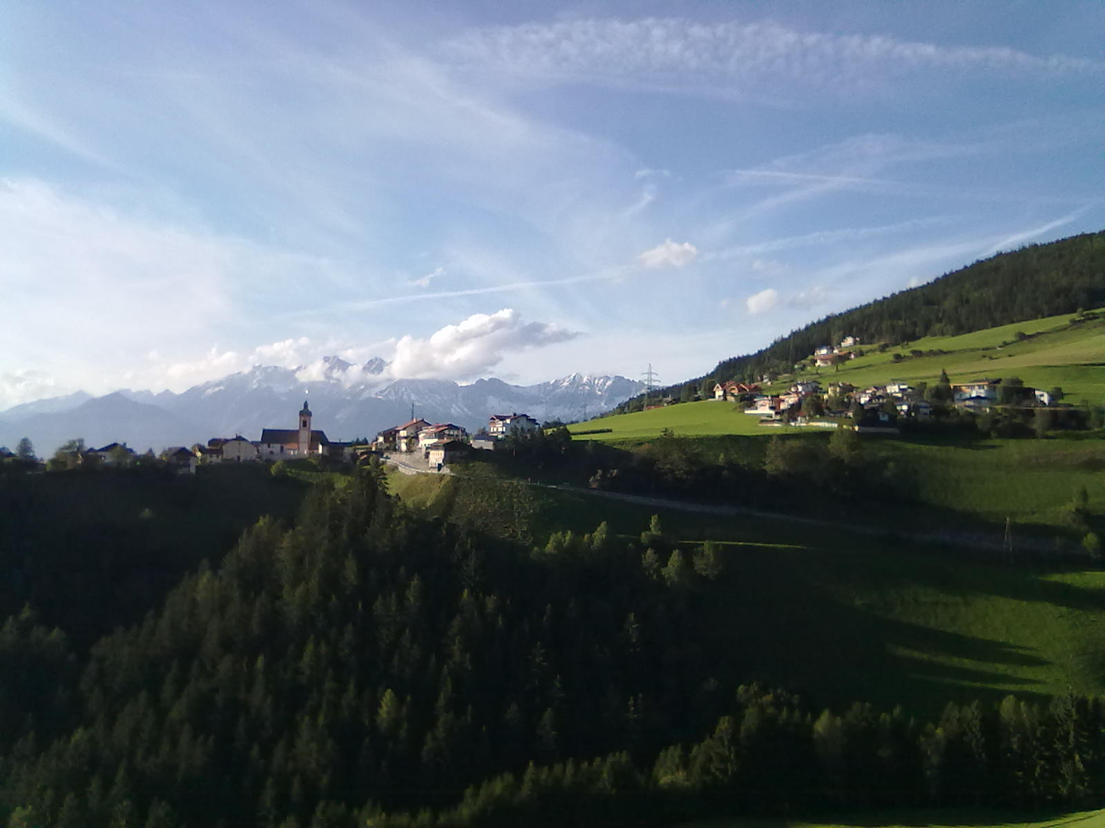 St. Peter (Gemeinde Ellbögen)